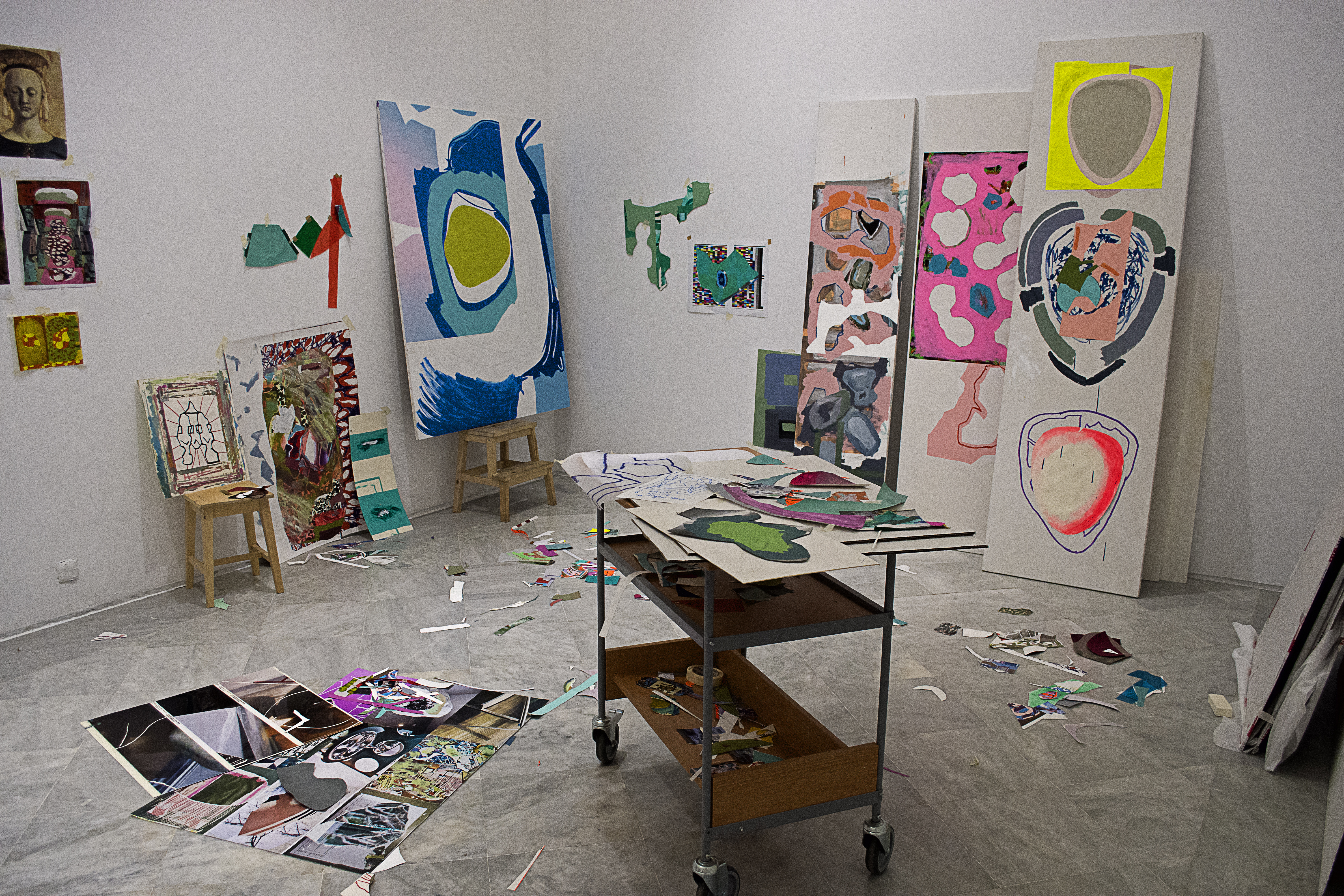 Recreación del estudio del pintor Luis Gordillo, para la retrospectiva del Centro Andaluz de Arte Contemporáneo de Sevilla en 2016